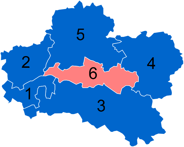 Résultats des élections législatives du Loiret en 2012